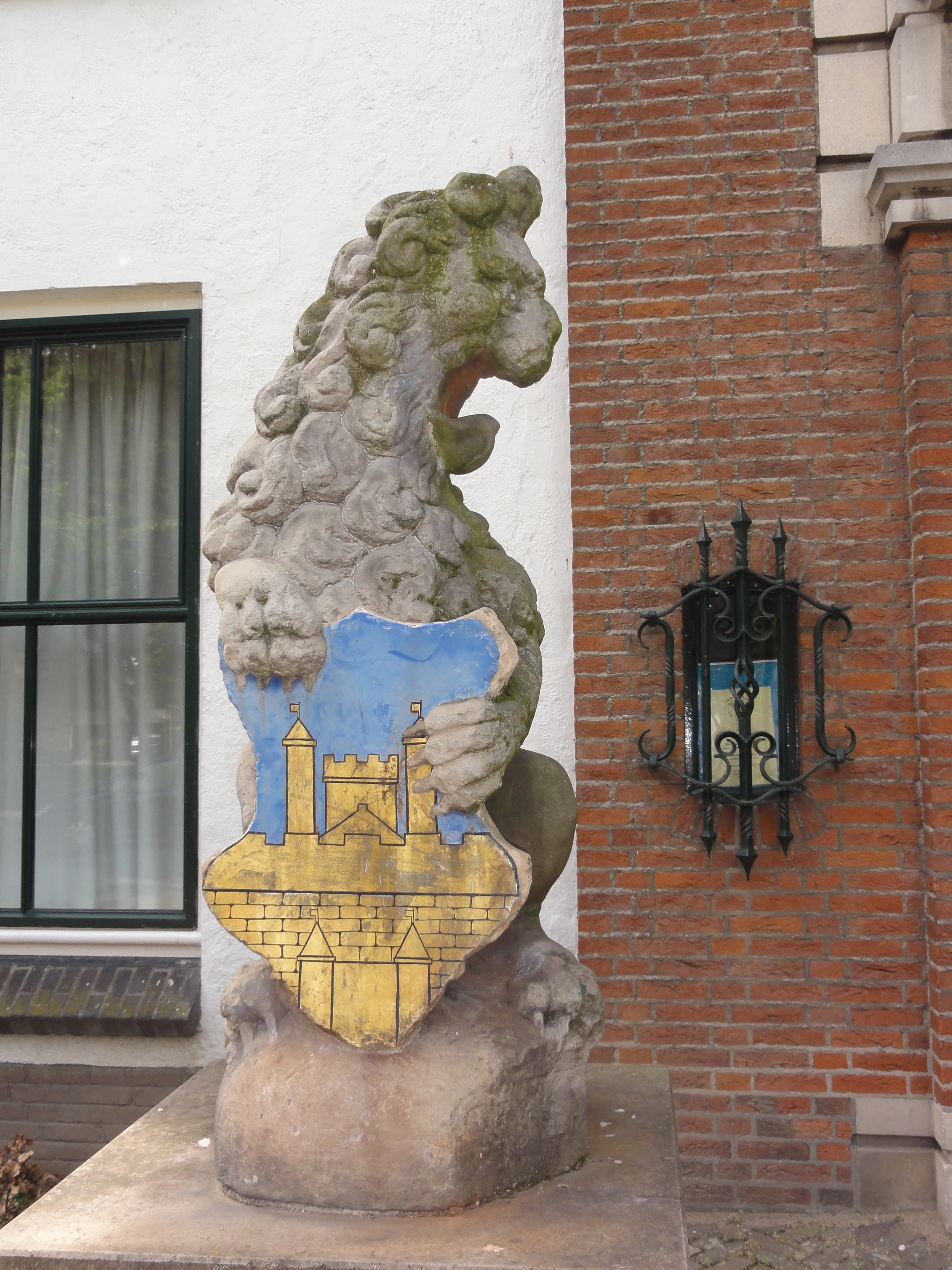 Gendt (Lingewaard) gemeentehuis